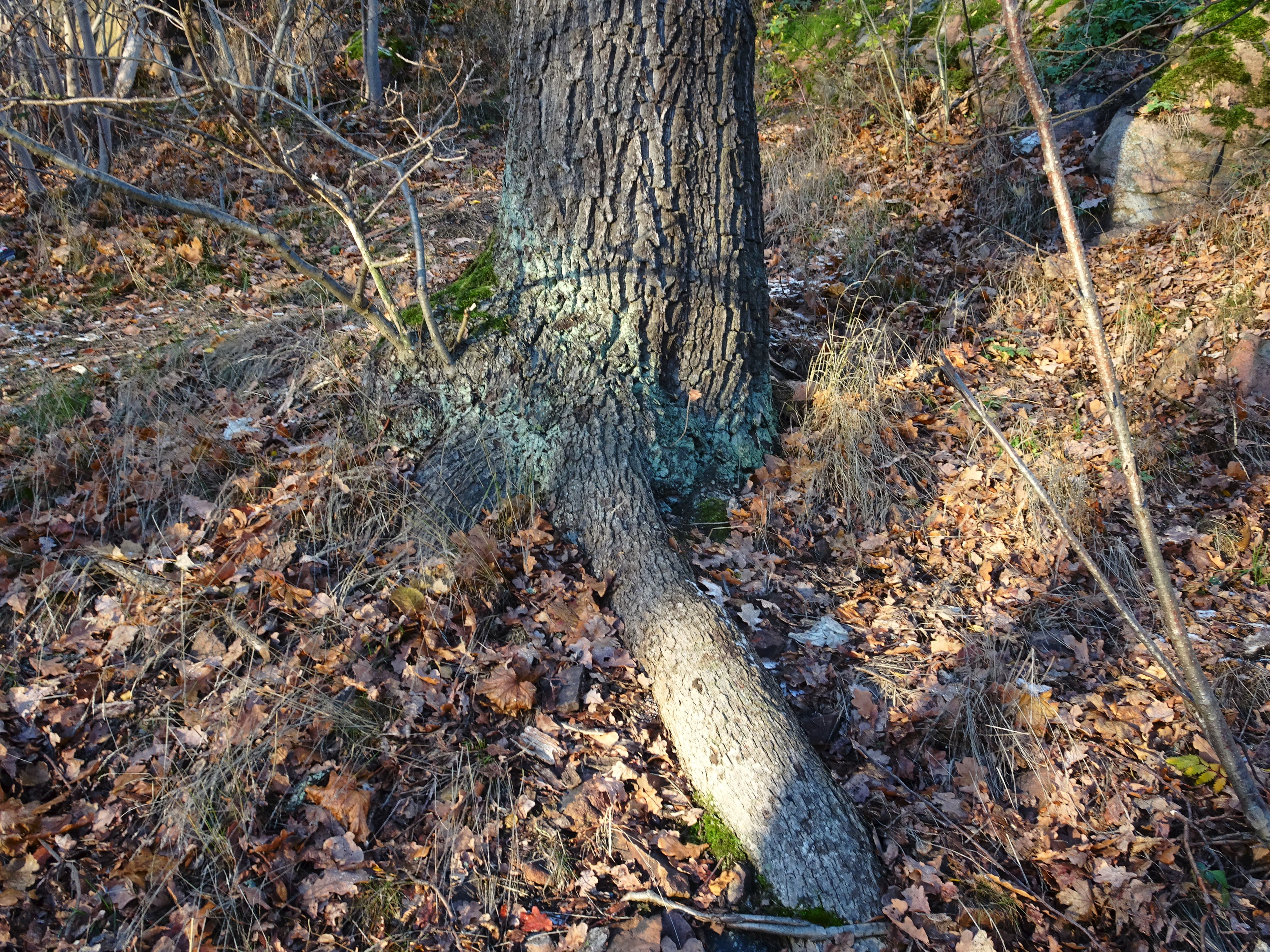 I bergssluttningen cirka 30-40 meter söder om höghuset på Fyrverkarbacken 23 i Marieberg, Kungsholmen växer "Linnés päronträd".